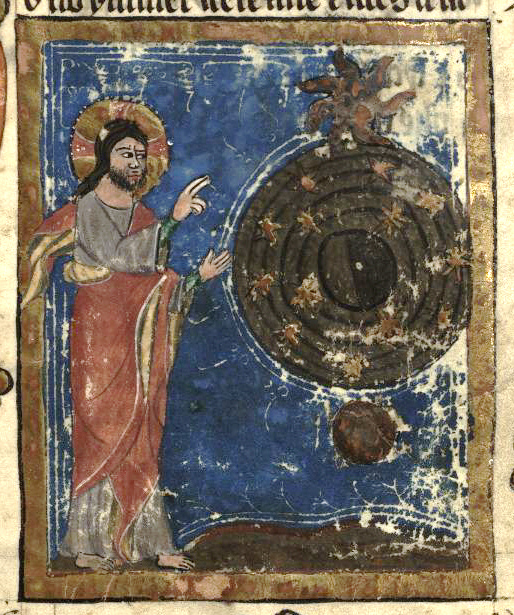 Rudolf von Ems: Weltchronik. Böhmen (Prag), 3. Viertel 14. Jahrhundert. Hochschul- und Landesbibliothek Fulda, Aa 88. Bildbeschreibung nach Martin Roland. Miniatur 2 1r Gott erschafft den Weltkreis